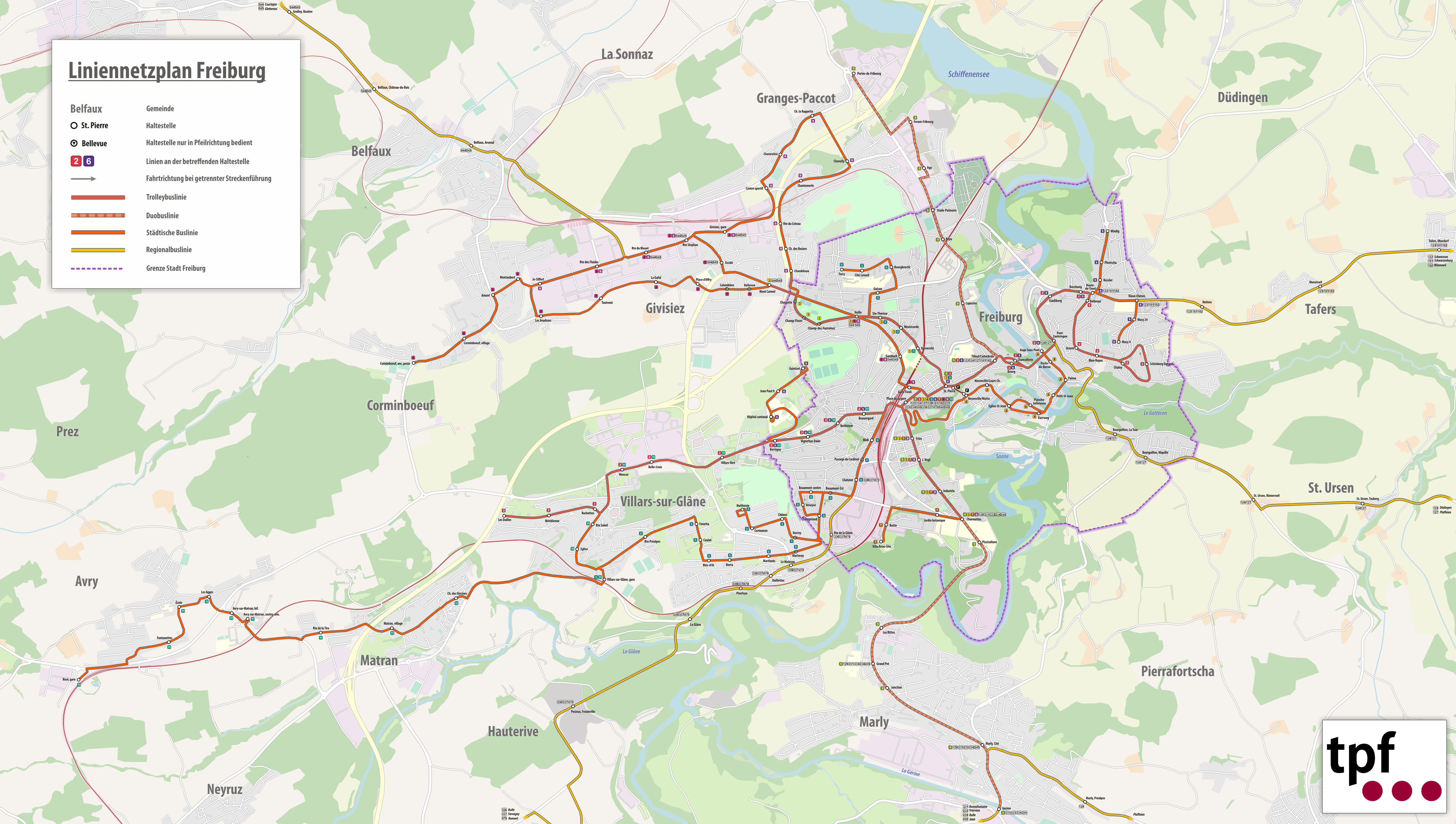 Liniennetzplan der Freiburgischen Verkehrsbetriebe, ab 15. Dezember 2019